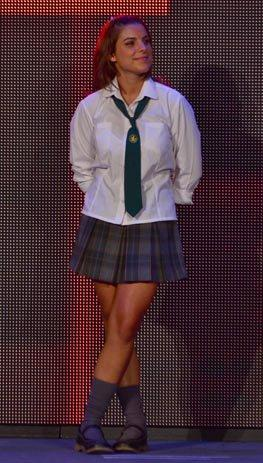 Nueva versión de esta foto